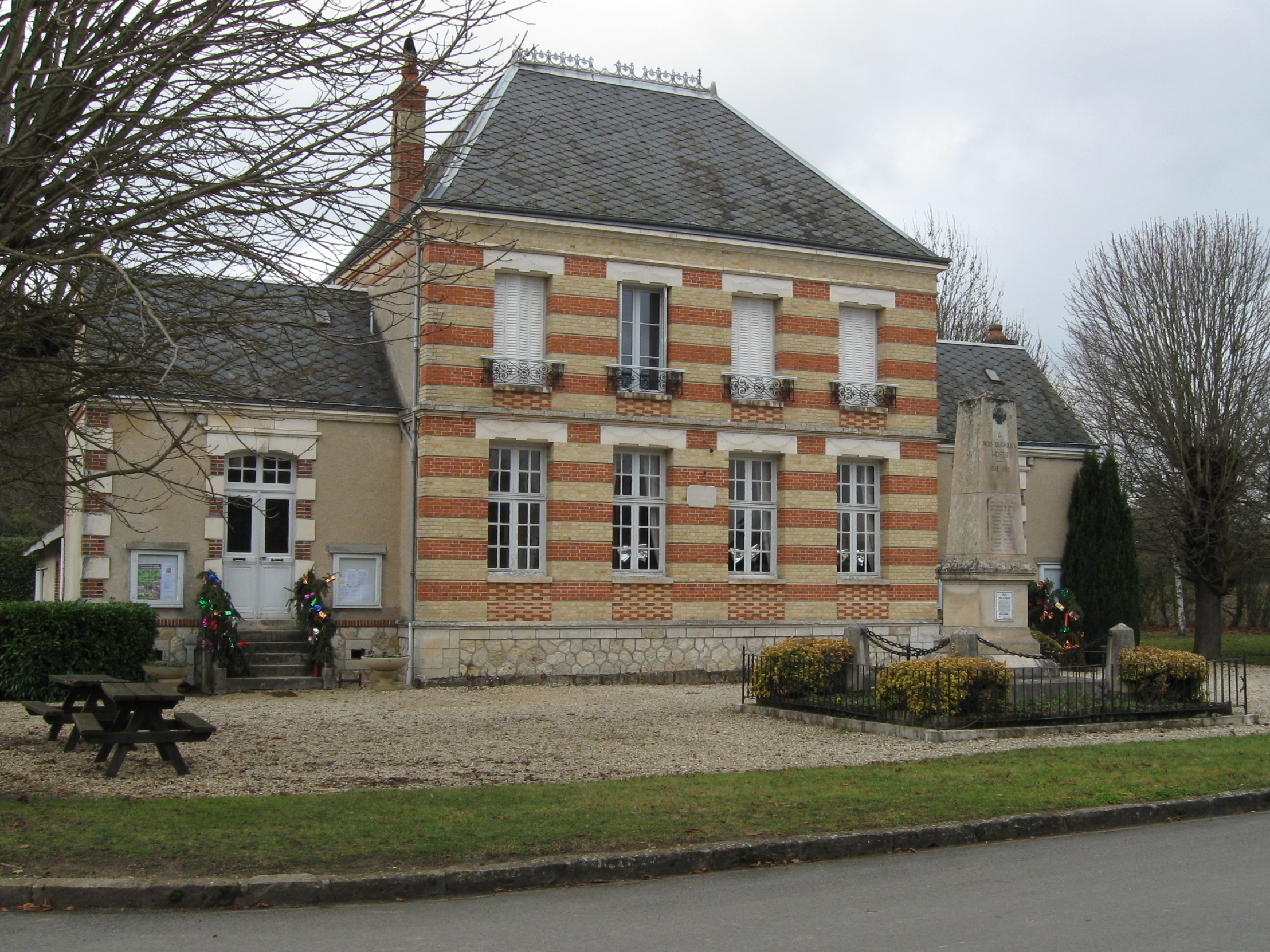 Escrignelles, la mairie.